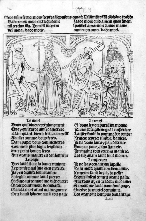 La Danse macabre. Paris, Guy Marchant, 1486. Fig. folio a iii : Un pape et un empereur. Illustration numérisée d'après le microfilm R 1760. Paris. BnF (Réserve des Livres rares et précieux). Cote : Res Ye 189/Microfilm R 1760